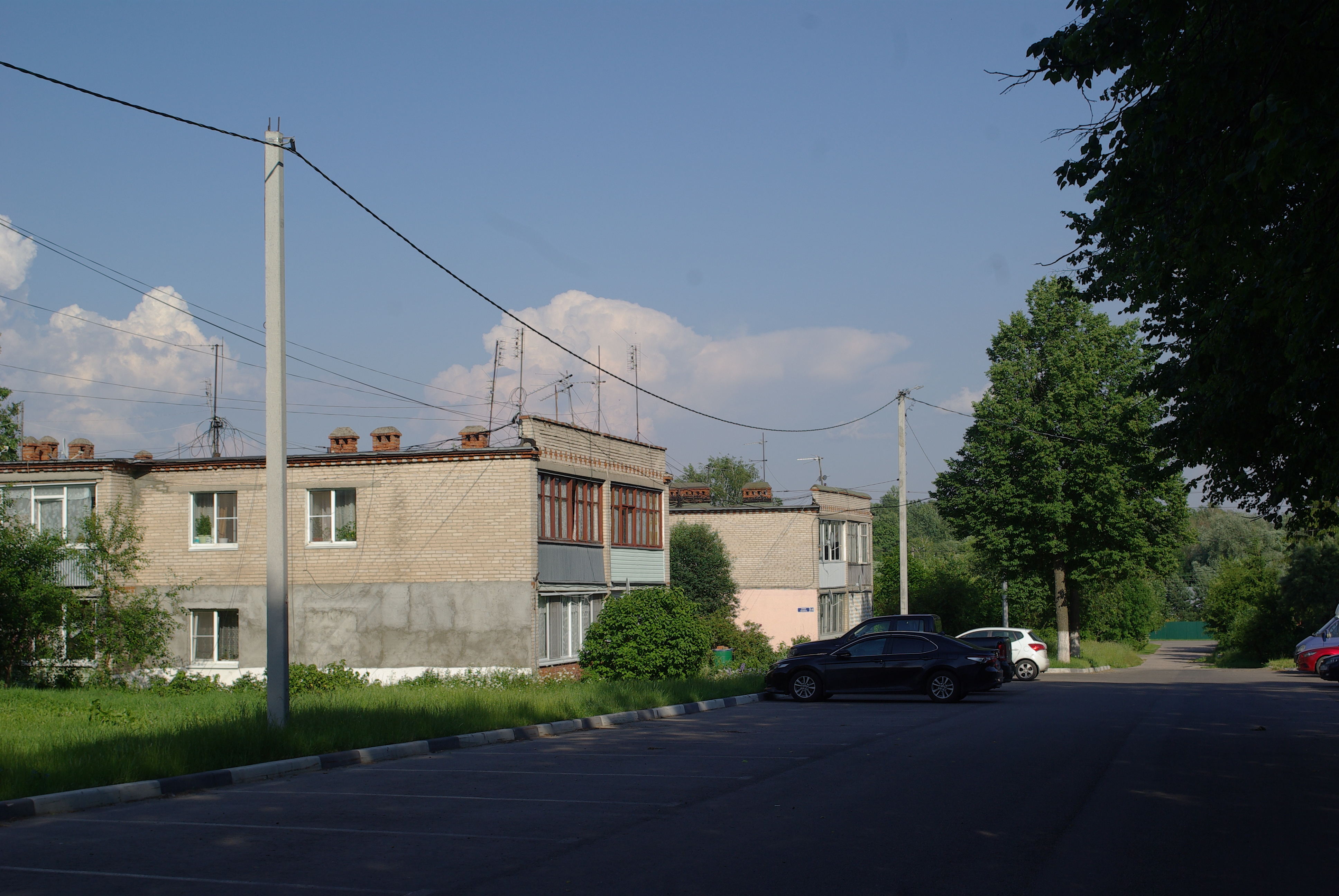 Посёлок Татариново